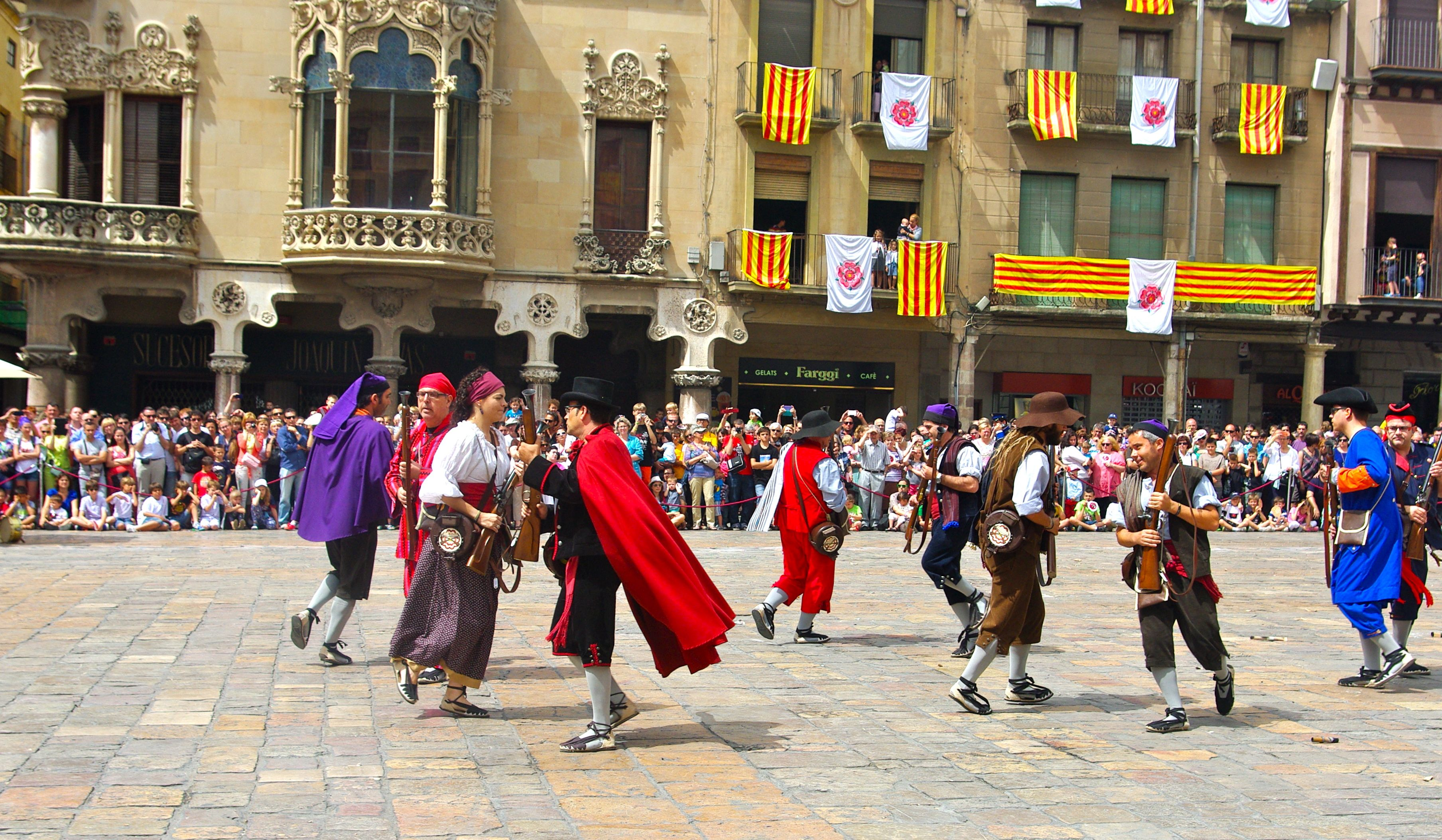 Ball de Pere Joan Barceló el dia de sant Pere de 2014. Plaça del Mercadal, Reus